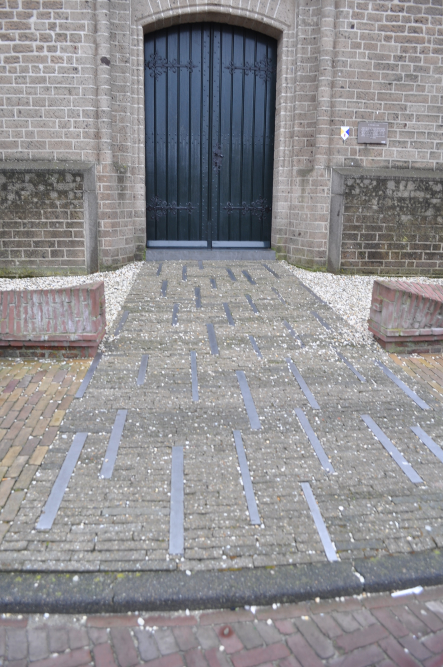 Werk: Leeuwensprong; Kunstenaar: Jan Jacobs Mulder; Jaar: 2005; Straat: Oostergouw; Materiaal: Stainless steel.